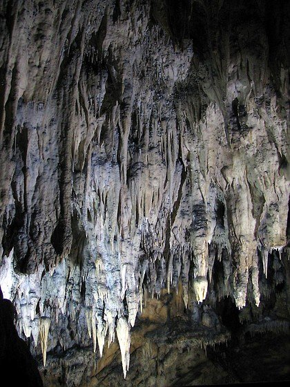 Barac's caves